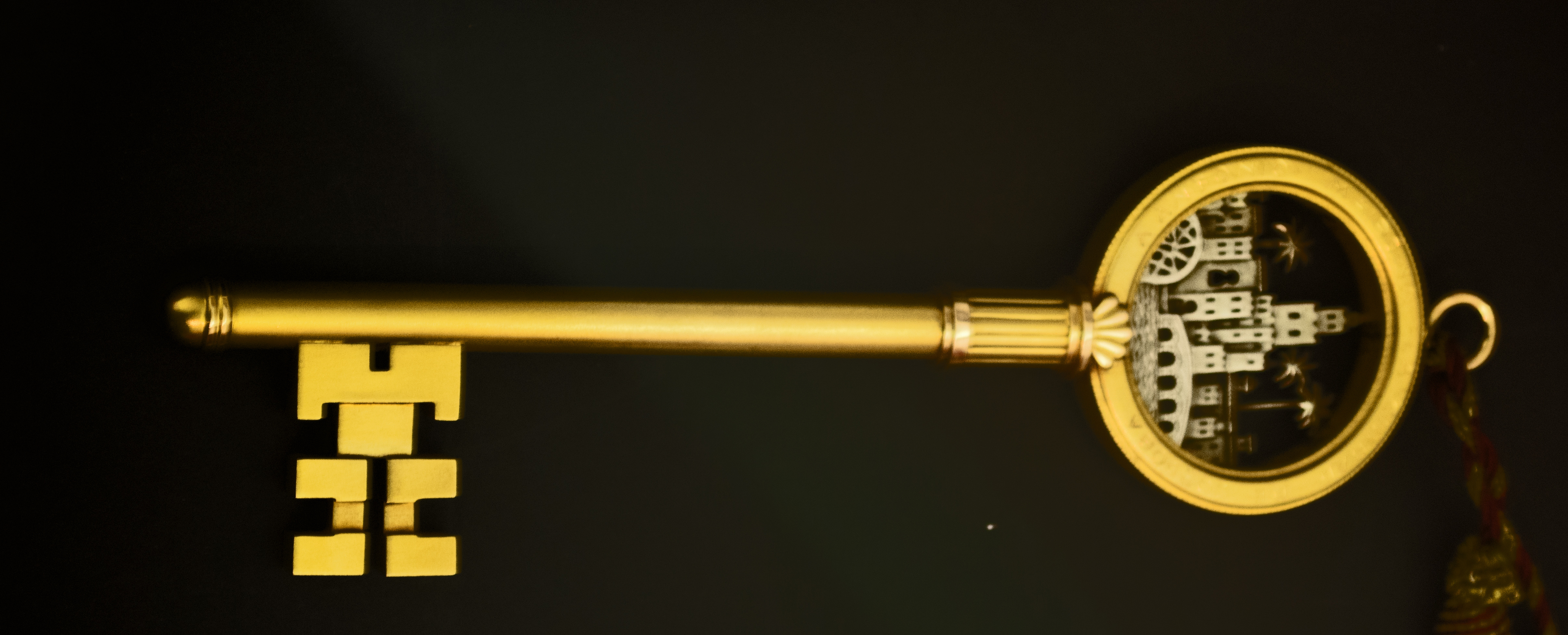 Llave de Oro del Cante otorgada a Antonio Mairena en 1962.